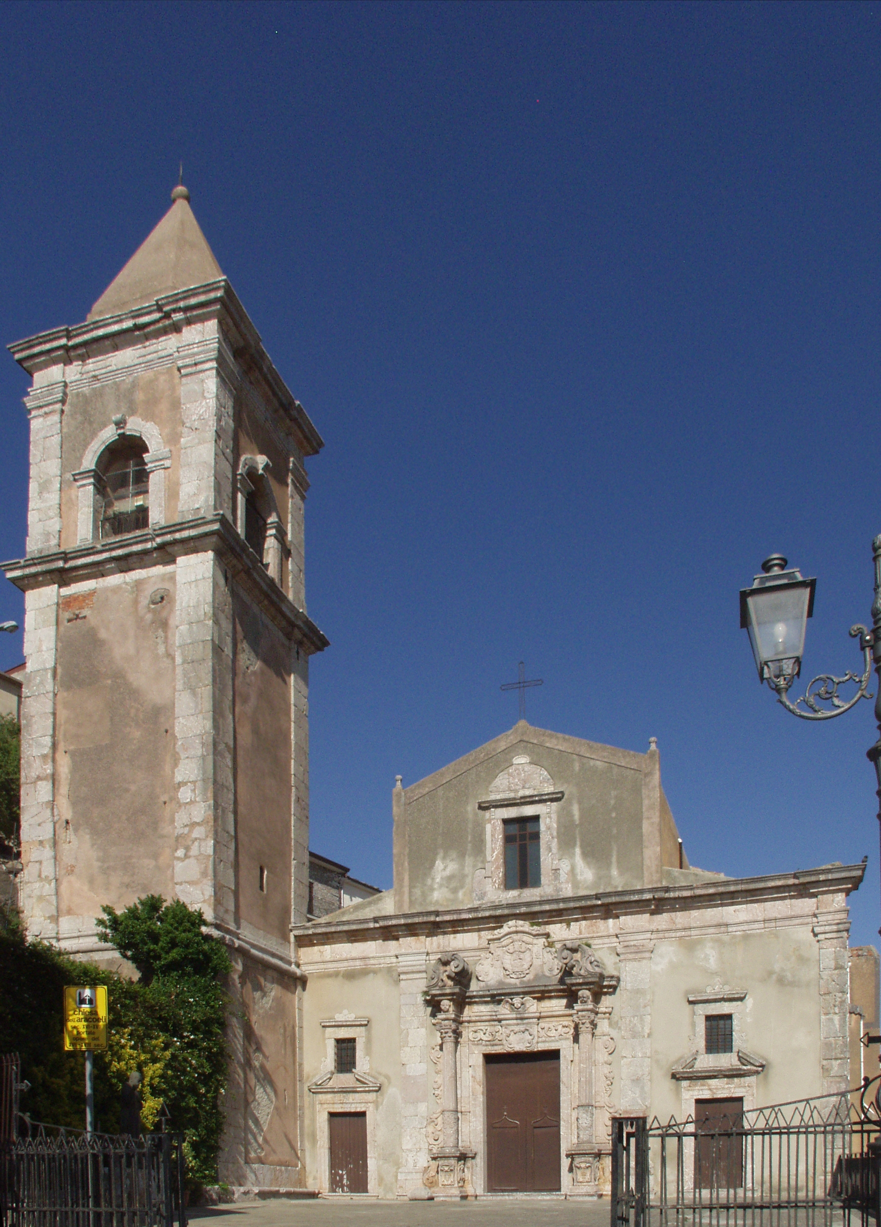 Chiesa di Santa Maria dell’Ara Coeli sec. XV, San Marco d’Alunzio